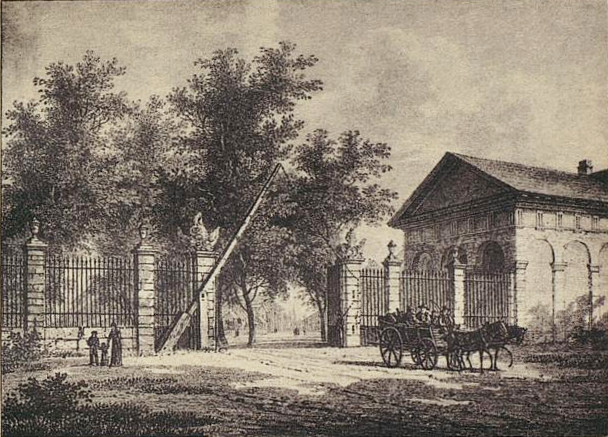 Das Mühlburger Tor war eines von ehemals sechs Stadttoren von Karlsruhe.